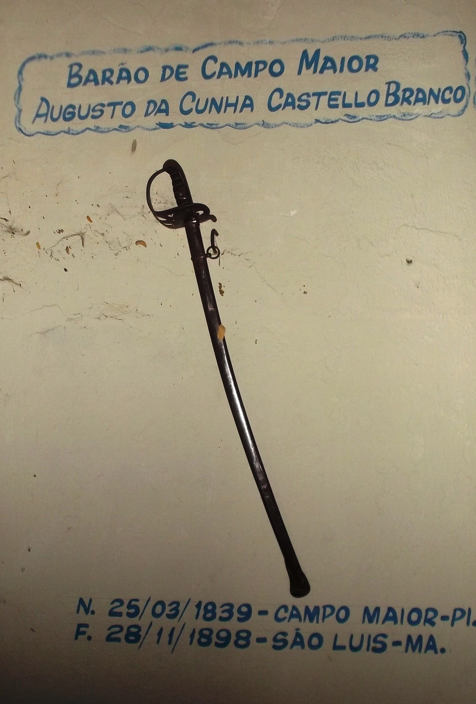 Espada do Barão de Campo Maior (Augusto da Cunha Castelo Branco) em uma casa cultura em Campo Maior.